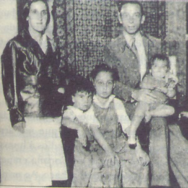 Syra Alonso, Francisco Miguel e os seus tres fillos